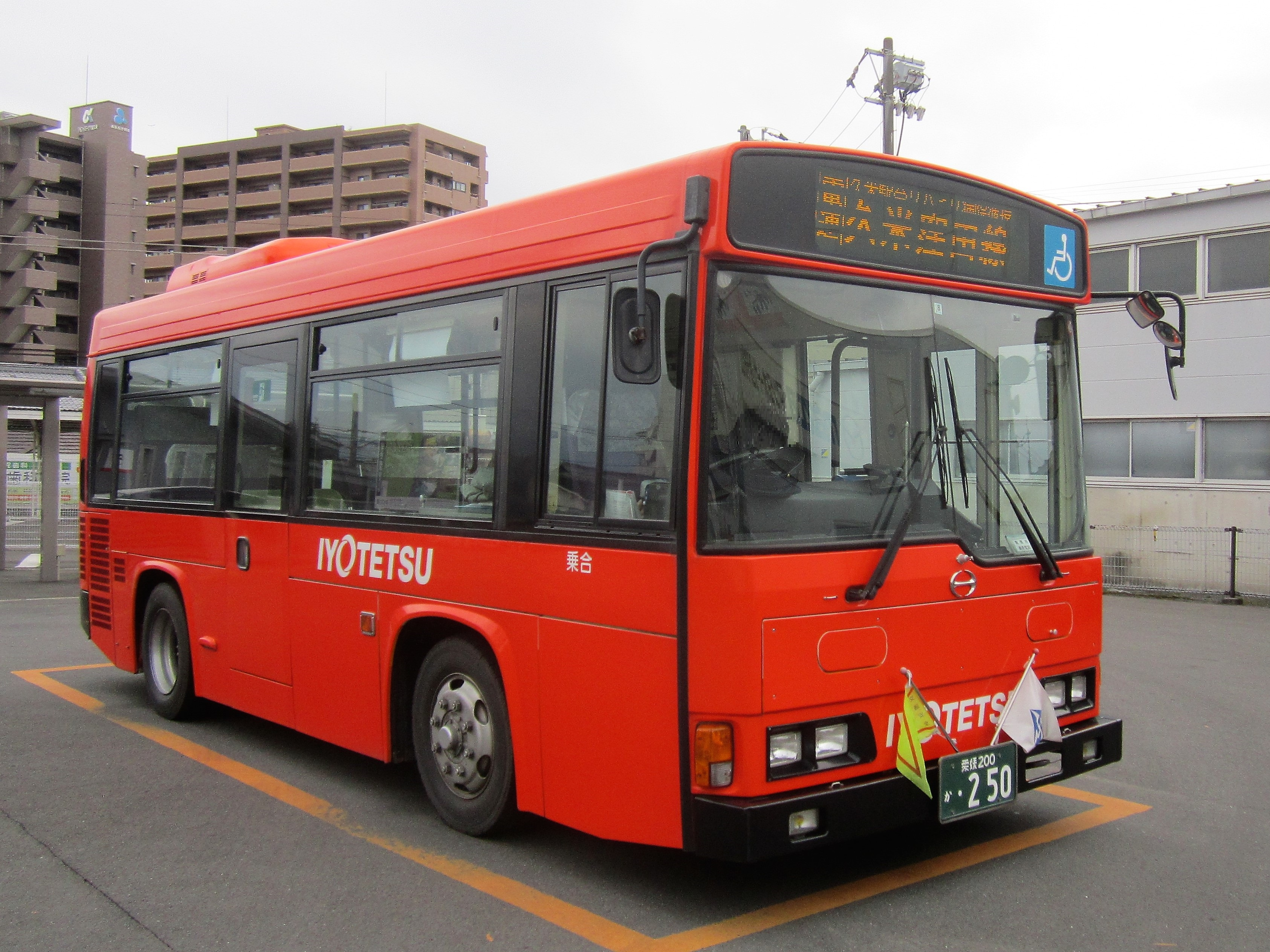 久米駅前に停車中の伊予鉄バス（電車連絡久米窪田線）